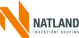 Logo korporátní identity